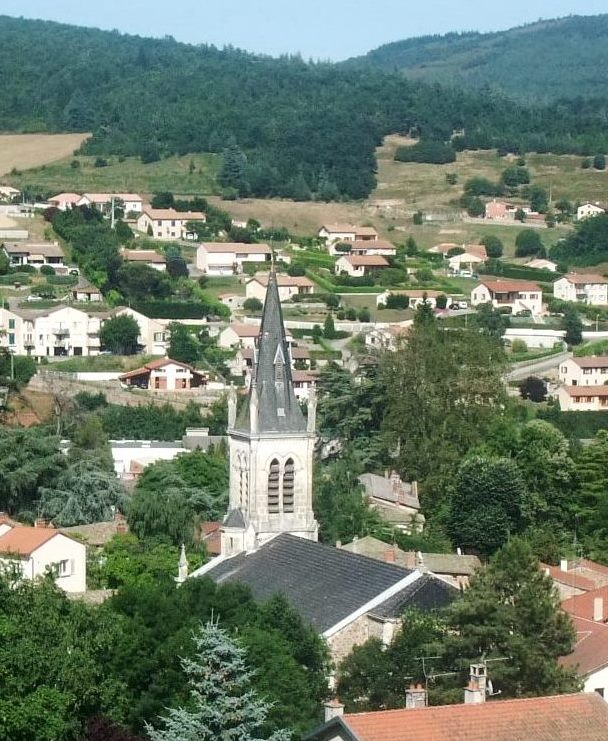 Saint-Marcel-lès-Annonay église et village